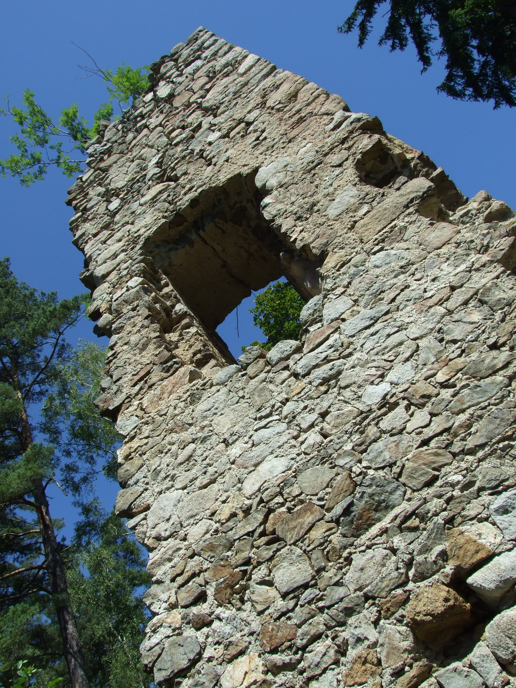 Hrad Louzek, zřícenina (Nažidla), mezi Malší a potokem Kotzbach, Nažidla